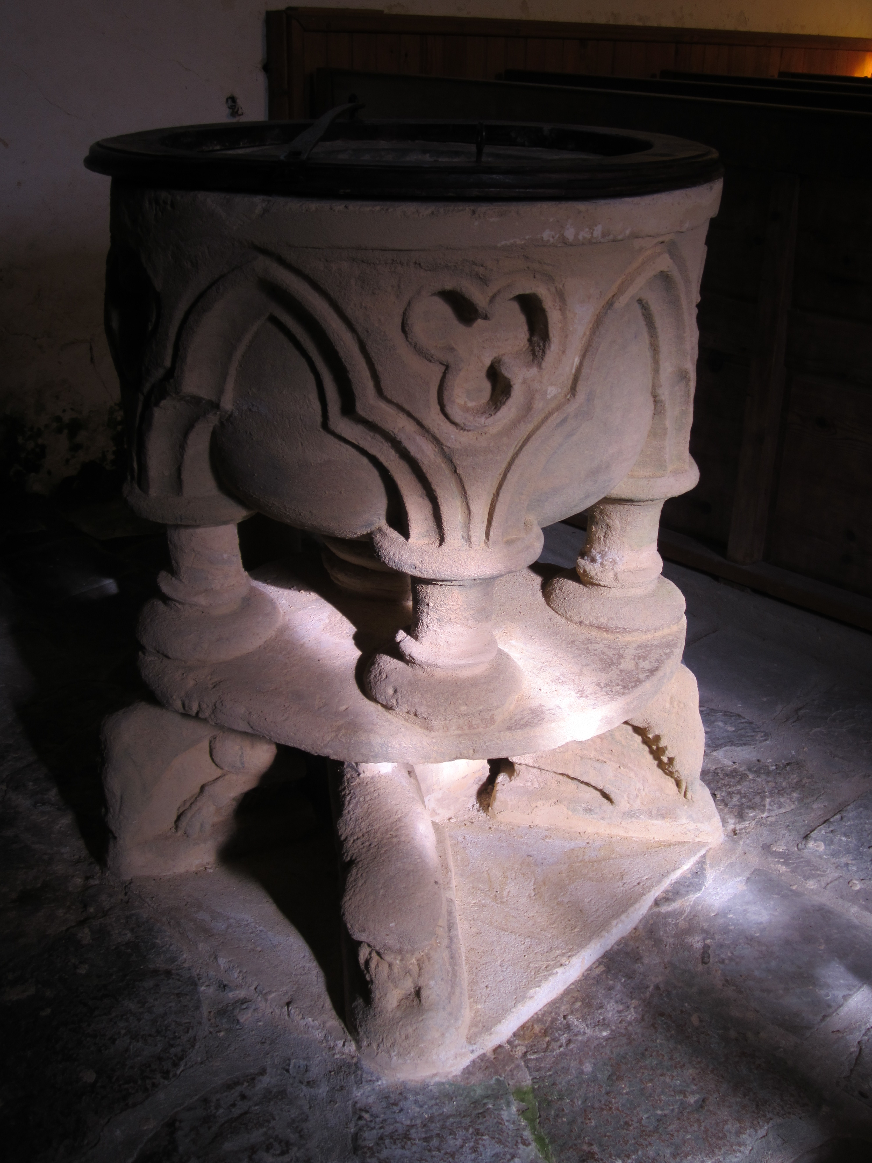 Ancteville, Manche